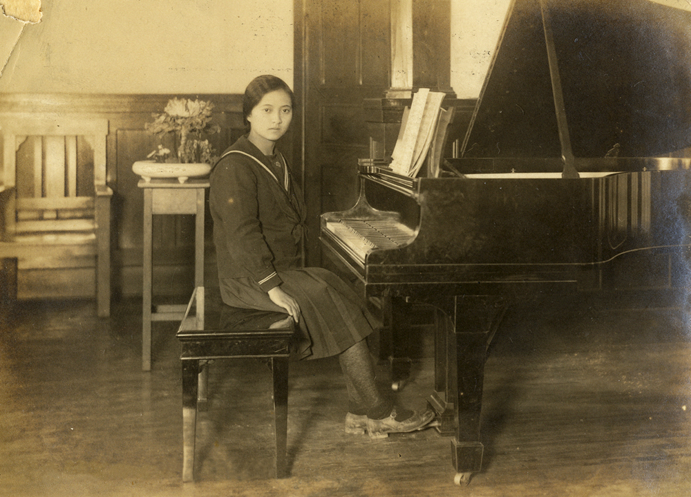 高慈美少女時的照片